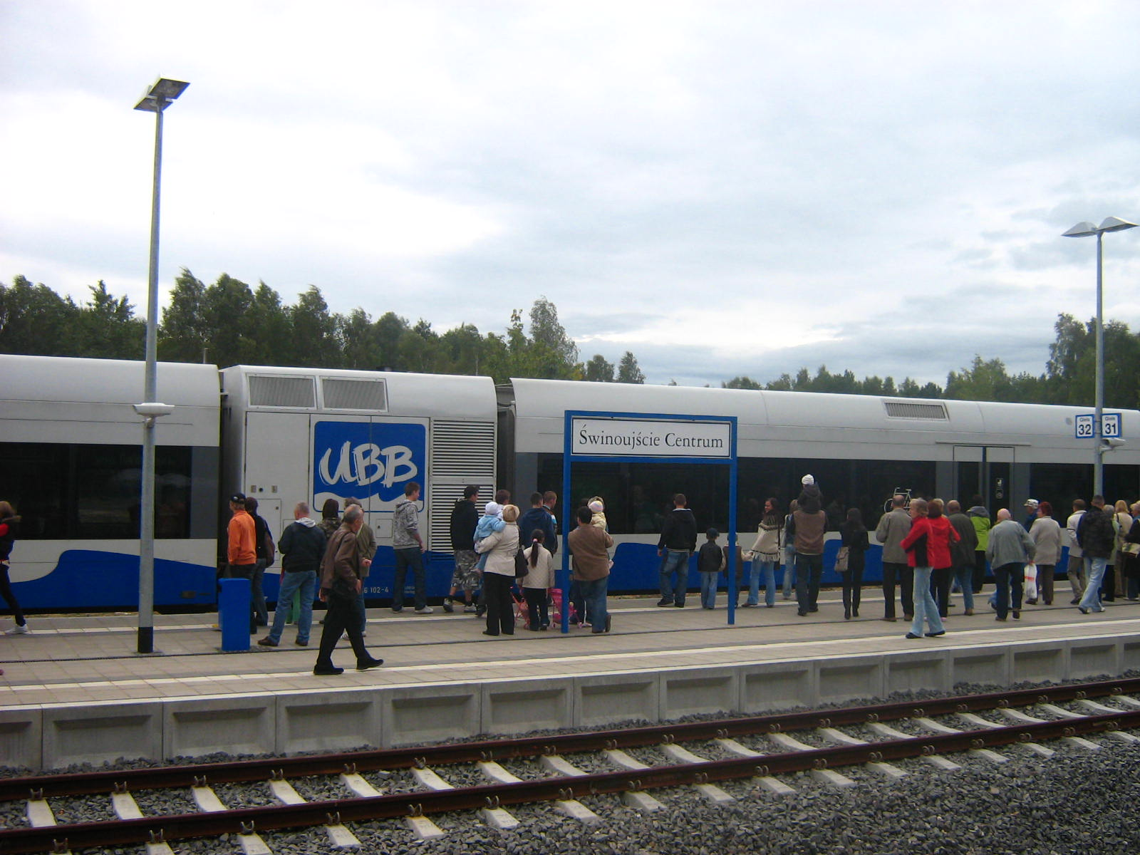 Pociąg UBB na stacji Świnoujście Centrum.